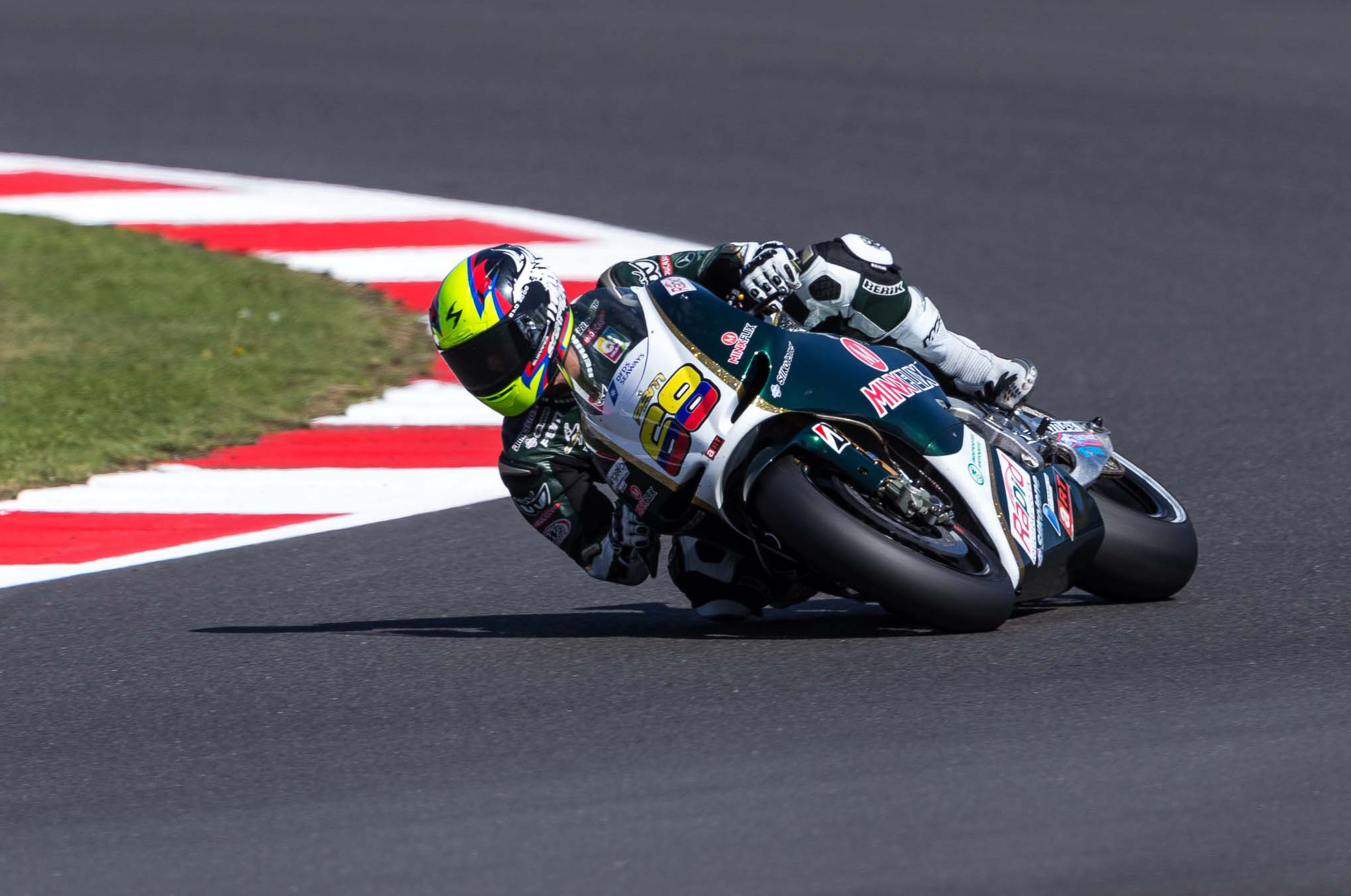 2013 Hertz British Grand Prix - MotoGP - #68 Yonny Hernández